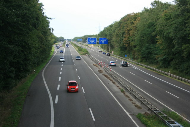 A44 am Aachener Kreuz